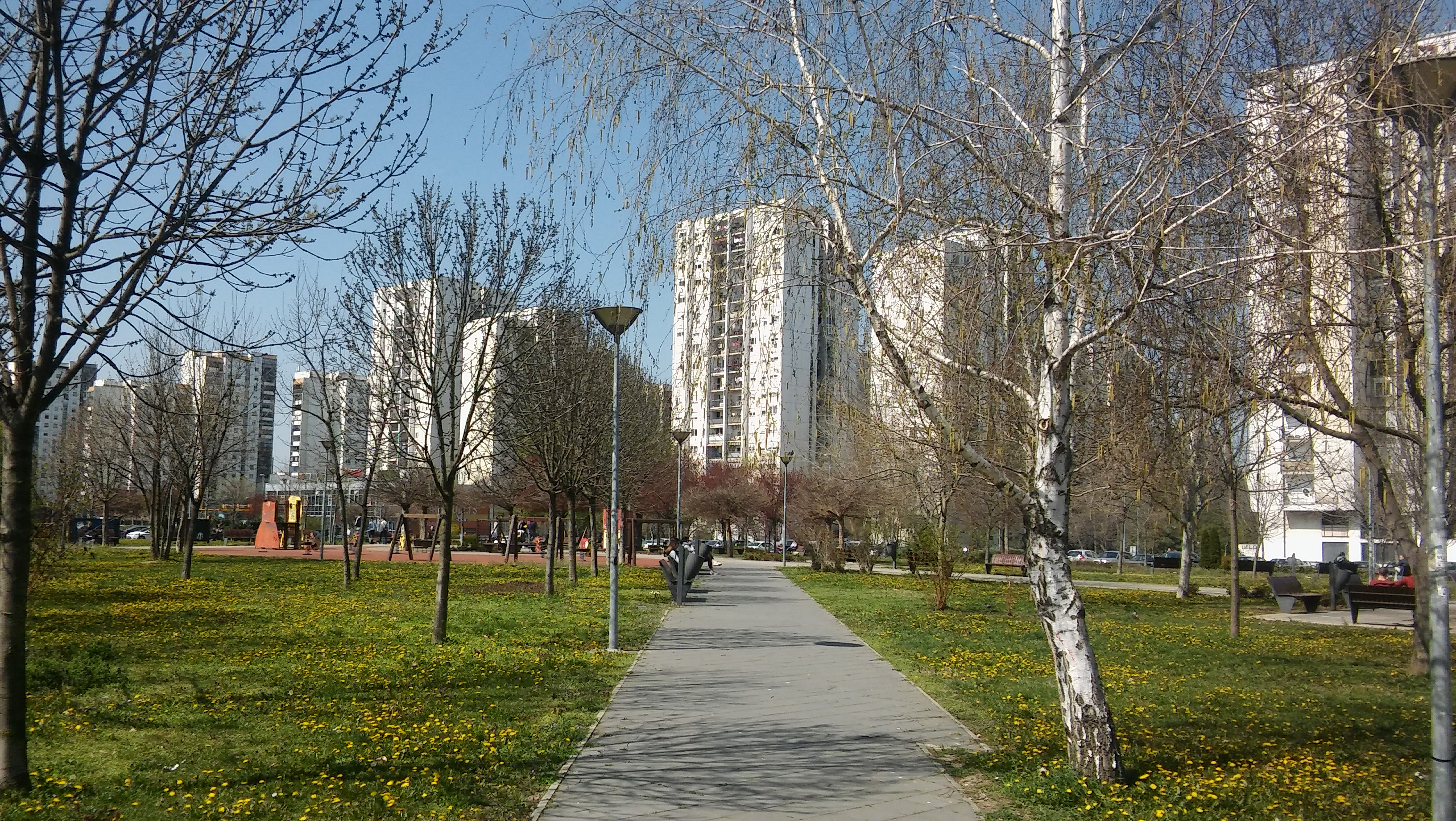 Srpskohrvatski / српскохрватски: Park u Bloku 63 gradska opština Novi Beograd, Beograd, Srbija